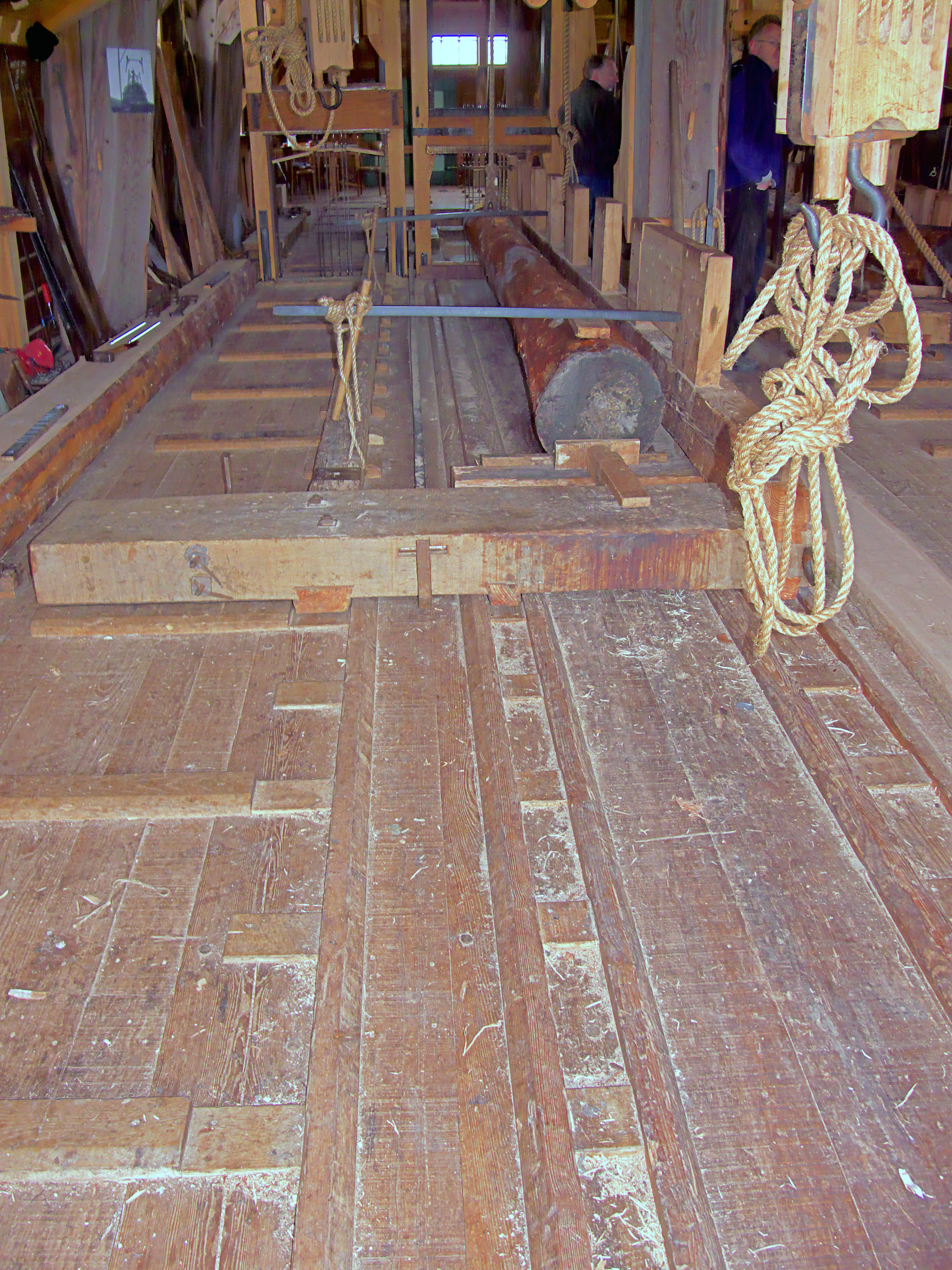 Molen Het Jonge Schaap, links het schulpraam. De zaagvloer is van Amerikaans grenen (Pitch pine)